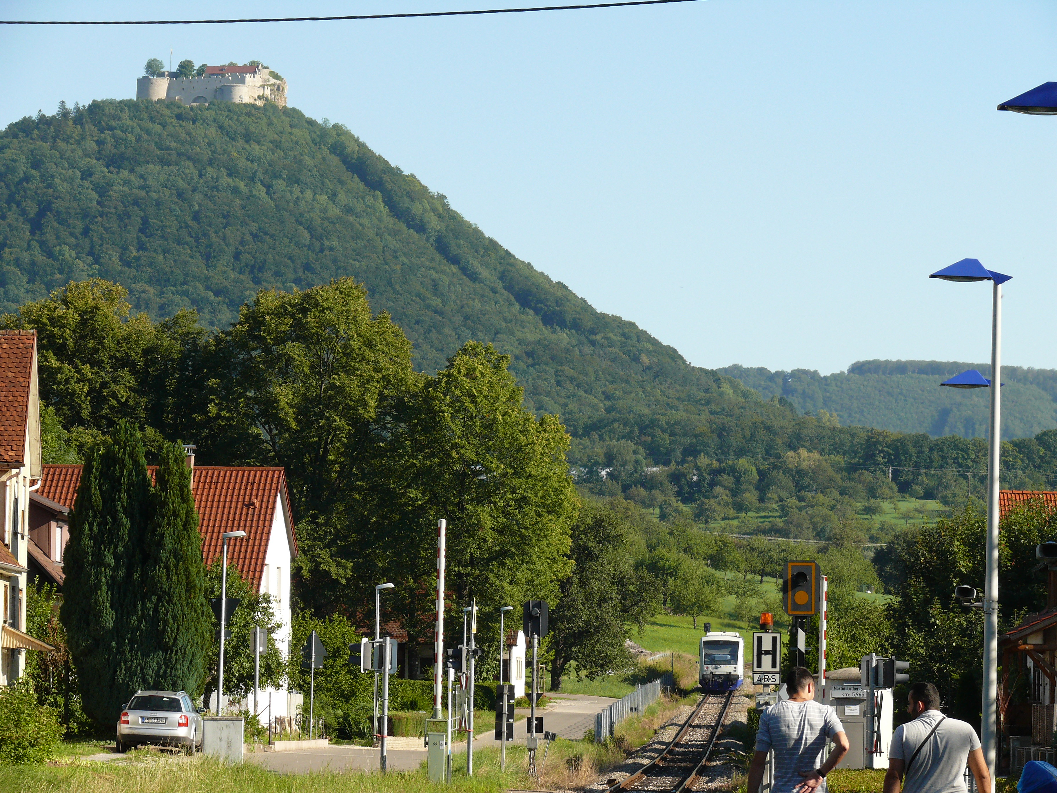 Ein RS1-Triebwagen (rechts unten) der Tälesbahn, bei seiner Ausfahrt aus Linsenhofen, unterhalb der Burg Hohenneuffen (links oben).